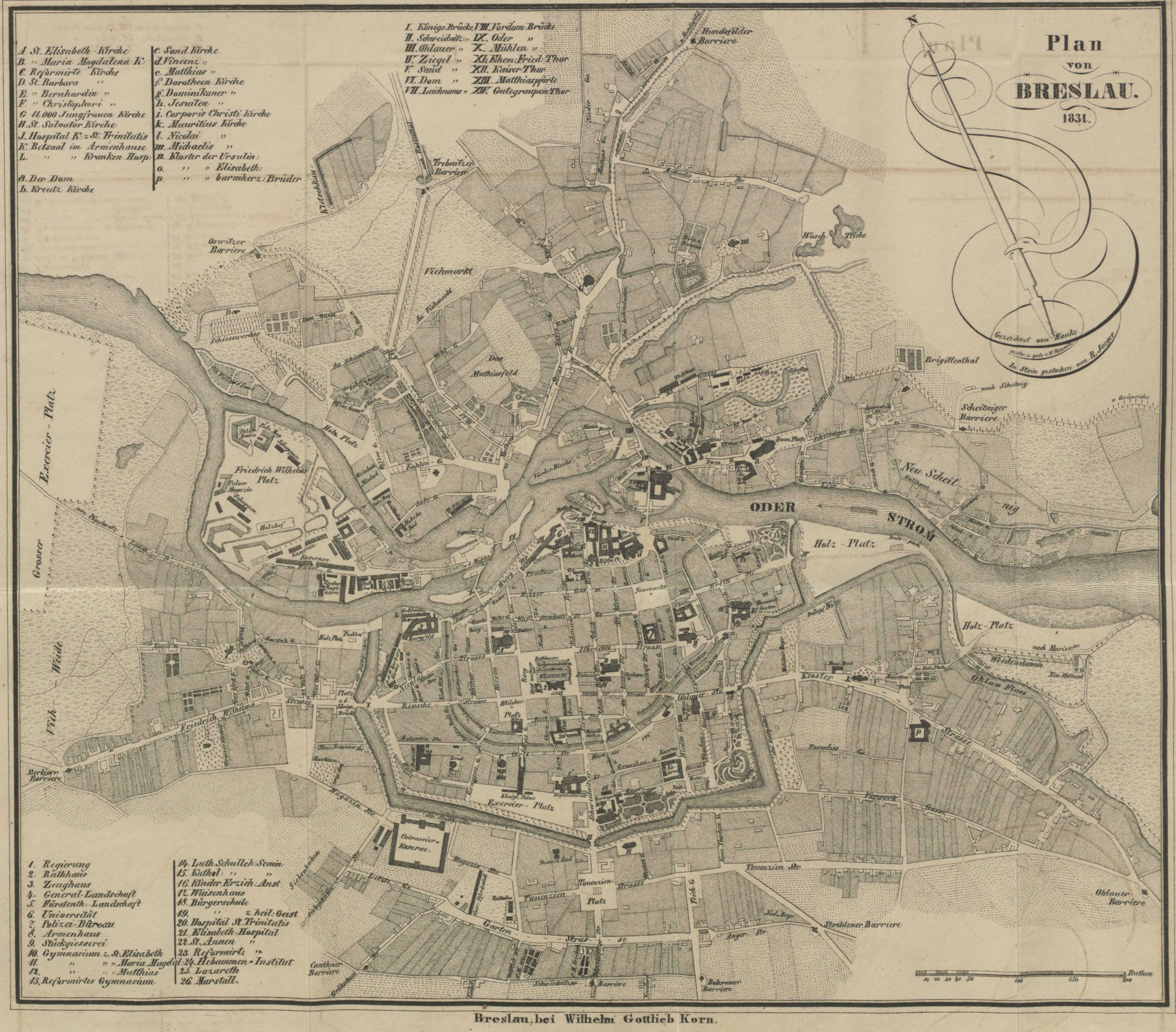 Stadtplan von Breslau aus dem Jahr 1831